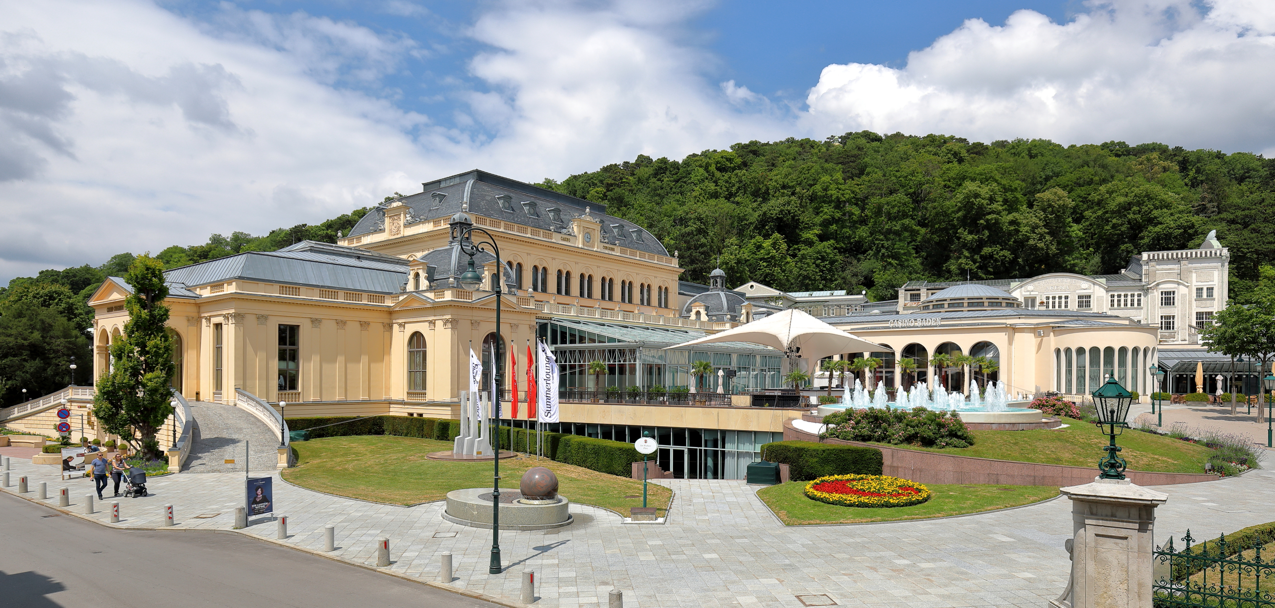 Das ehemalige Kurhaus und jetzige Casino sowie Kongress- und Veranstaltungszentrum an der Adresse Kaiser-Franz-Ring 1 in der niederösterreichischen Stadt Baden.Das Bauwerk im Stil der Neorenaissance wurde ab 1884 nach Plänen der Architekten Eugen Fassbender und Maximilian Katscher (1858–1917) errichtet und am 10. Juni 1886 feierlich als neues Kurhaus eröffnet. Am 12. April 1934 wurde im Kurhaus das Badener Casino als erster Ganzjahresbetrieb Österreichs der damaligen Österreichischen Casino A. G. eröffnet. Nach einem großen Umbau ab 1992 fand im März 1995 die Eröffnung als größtes Casino Europas samt Kongress- und Veranstaltungszentrum statt.